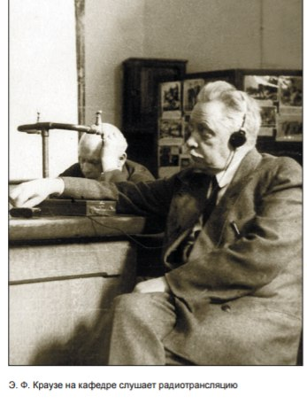 на кафедре неорганической химии слушает радиотрансляцию